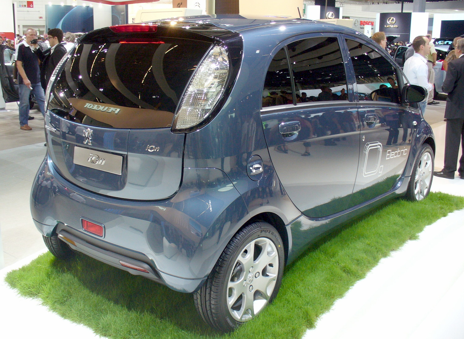 Peugeot iOn